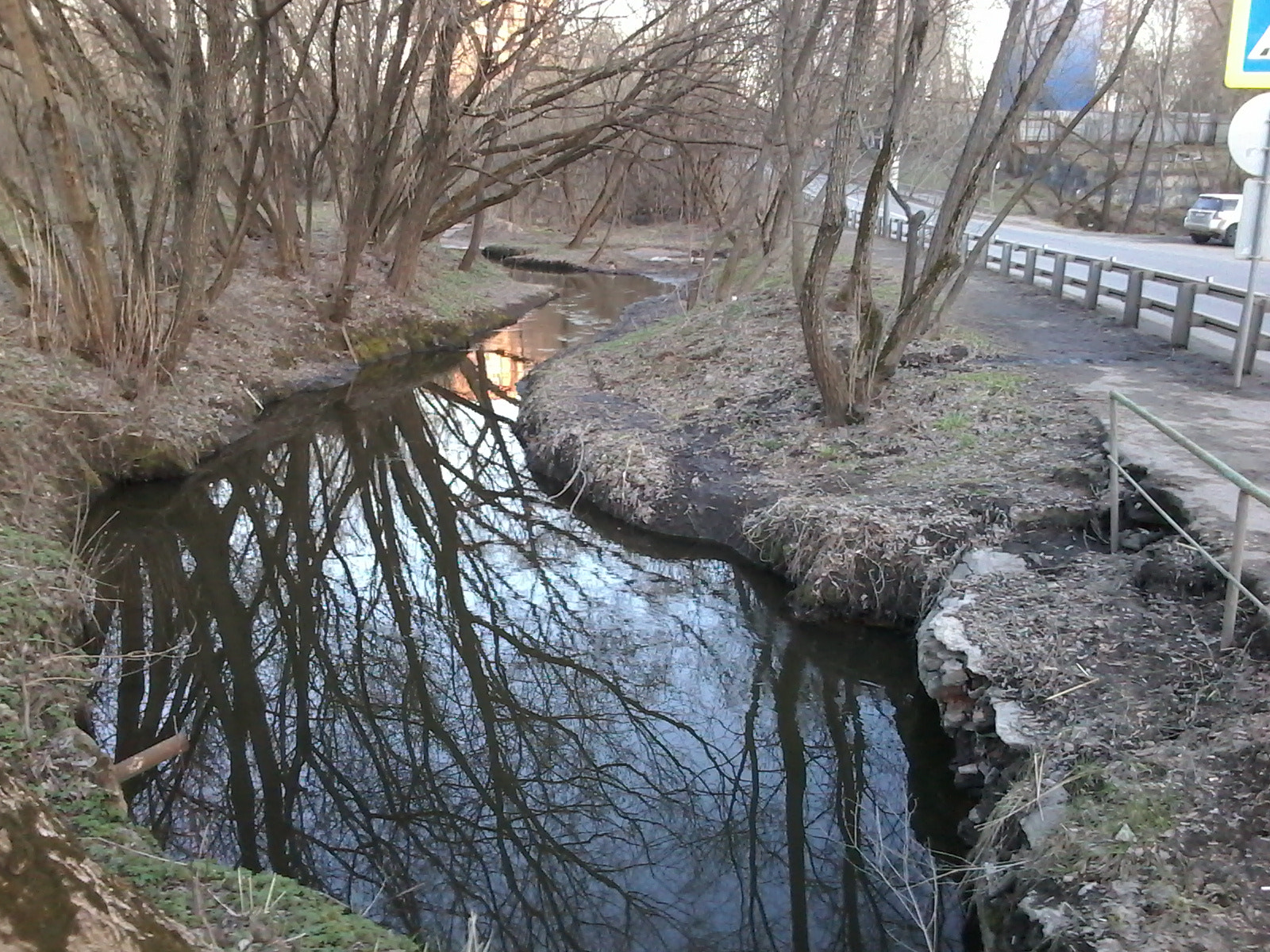 Сельскохозяйственная улица - северо-восточная граница ВДНХ. Река Каменка пересекает улицу в трубе (справа) и вскоре впадает в Яузу на резервной территории ГБС.